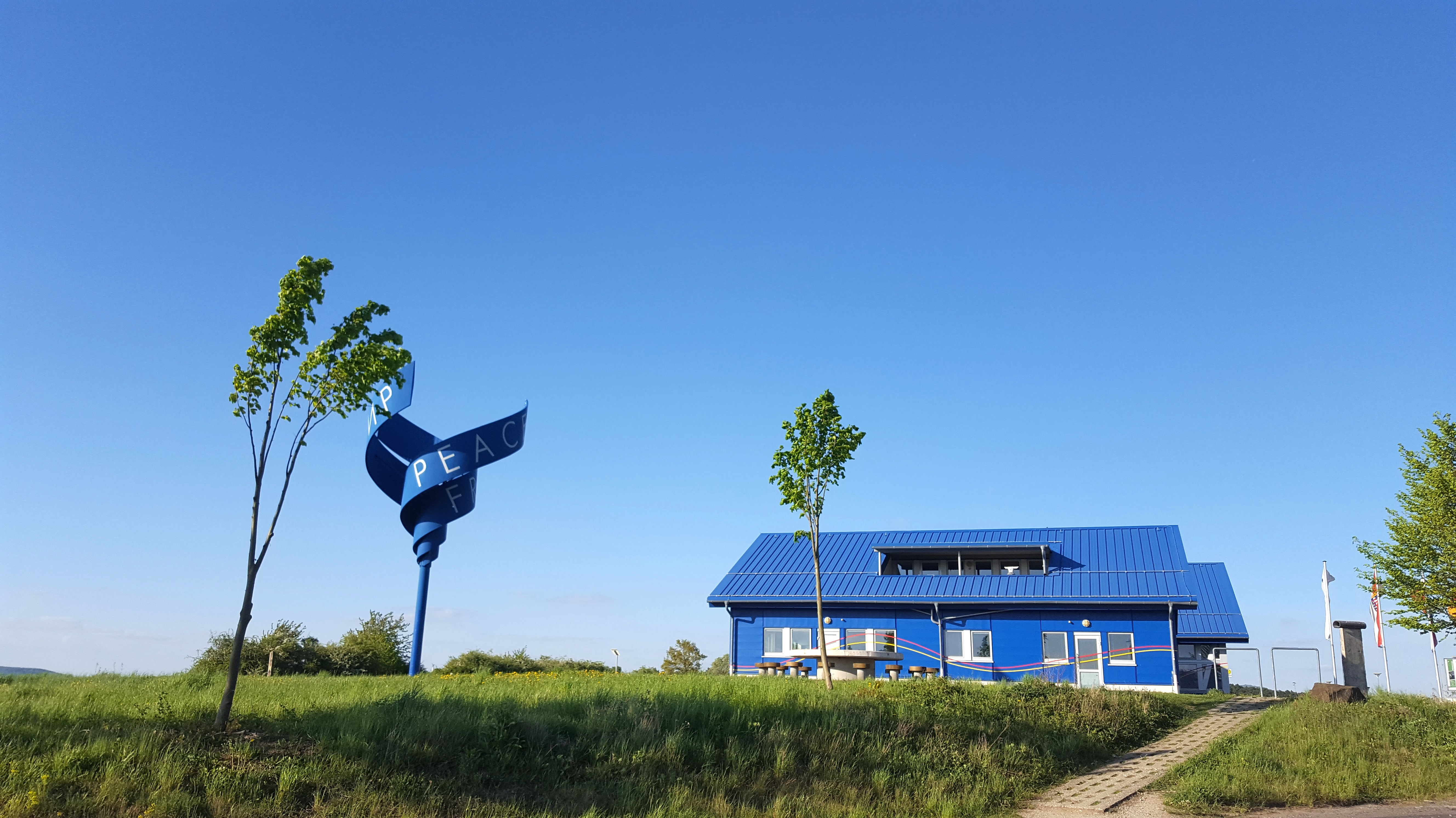 Point Alpha "Das Haus auf der Grenze", links die Grenzsäule der DDR Nr. 1722